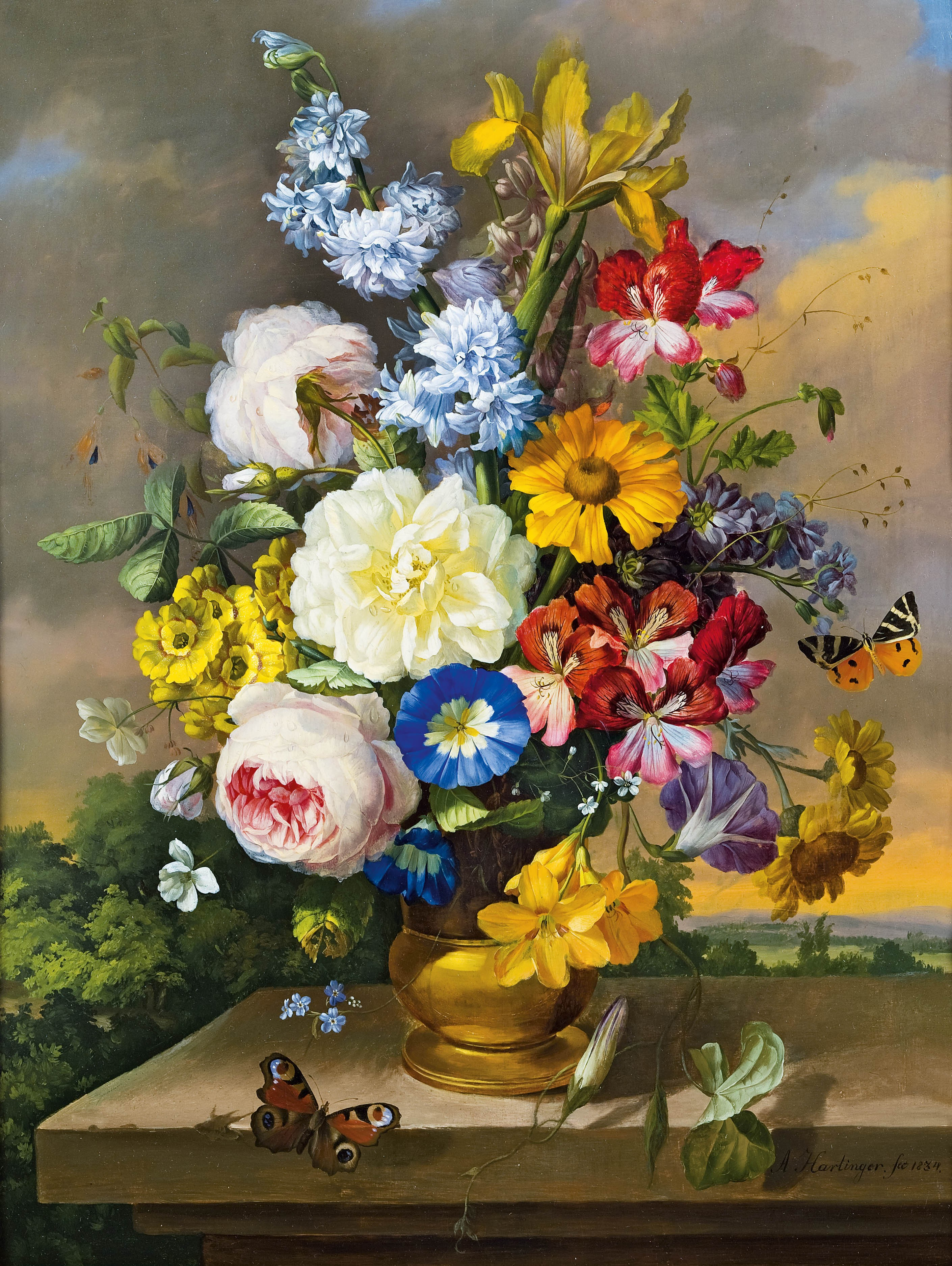 Blumenstilllebenlabel QS:Lde,"Blumenstillleben"